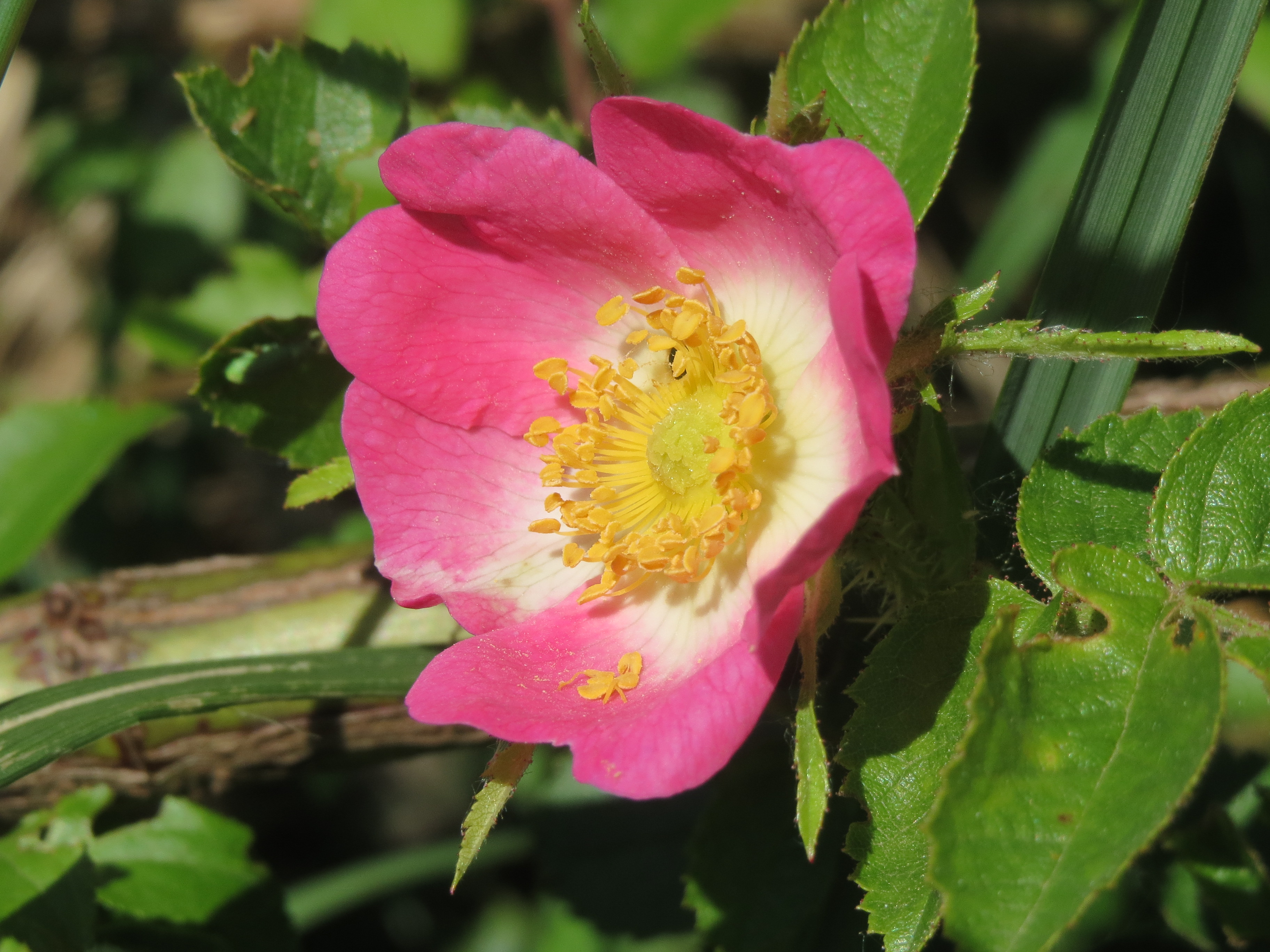 Wein-Rose (Rosa rubiginosa) im Hockenheimer Rheinbogen